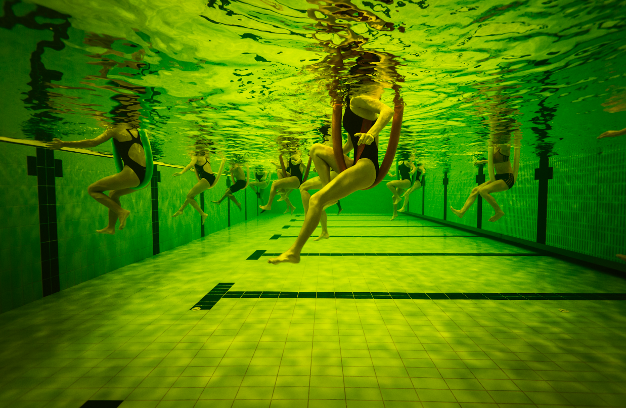 vue subaqua d'un cours d'aquagym